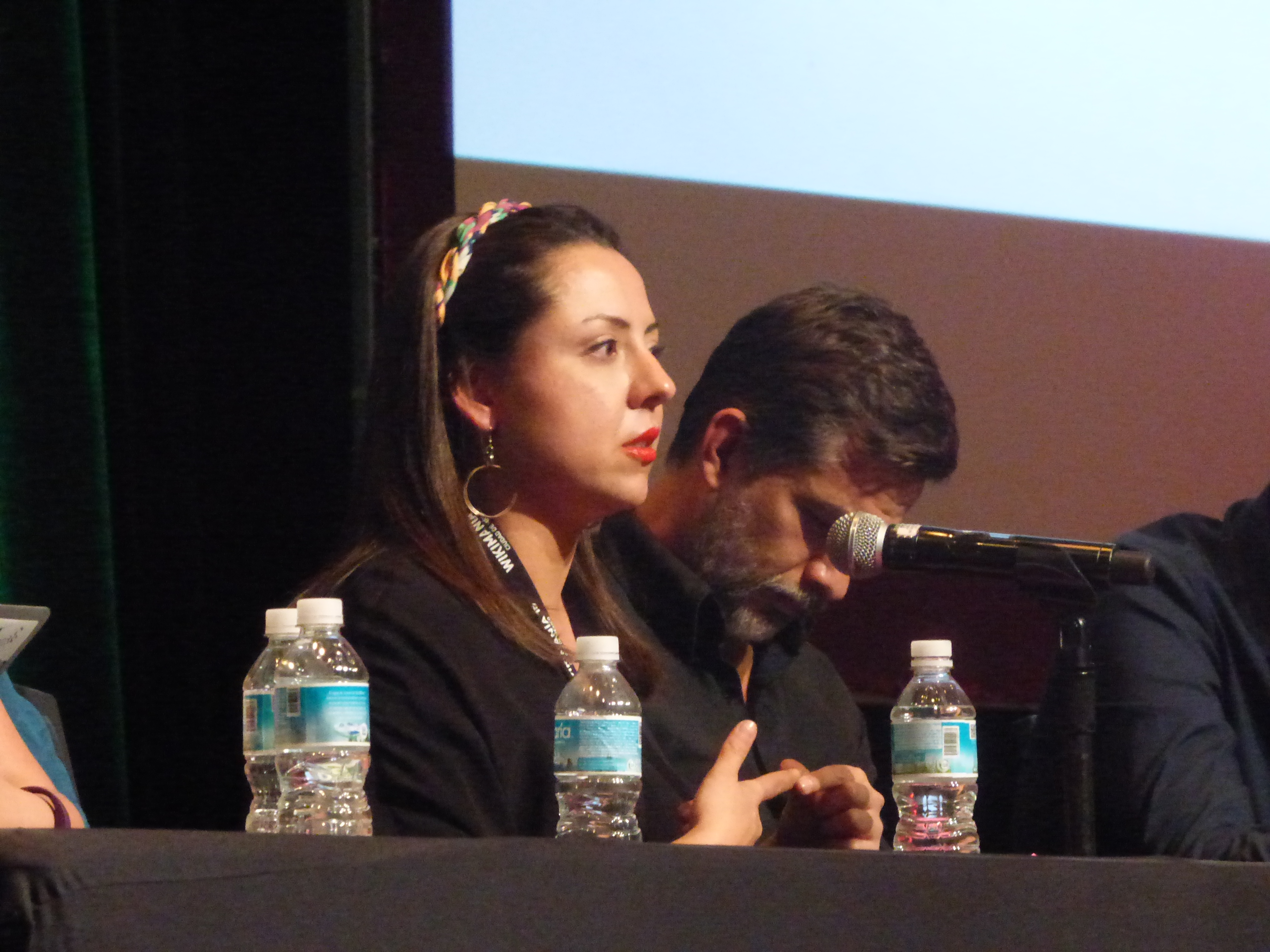 Carlos Brito, Red en Defensa de los Derechos Digitales (R3DMX, Digital Rights Defense Network) Darío Ramírez, Article 19 Mexico Katitza Rodríguez, Electronic Frontier Foundation (EFF) Renata Ávila, Web we want Paz Peña, Derechos Digitales Yana Welinder, Wikimedia Foundation Moderator: Luis Fernando García, Red en Defensa de los Derechos Digitales (R3DMX, Digital Rights Defense Network)